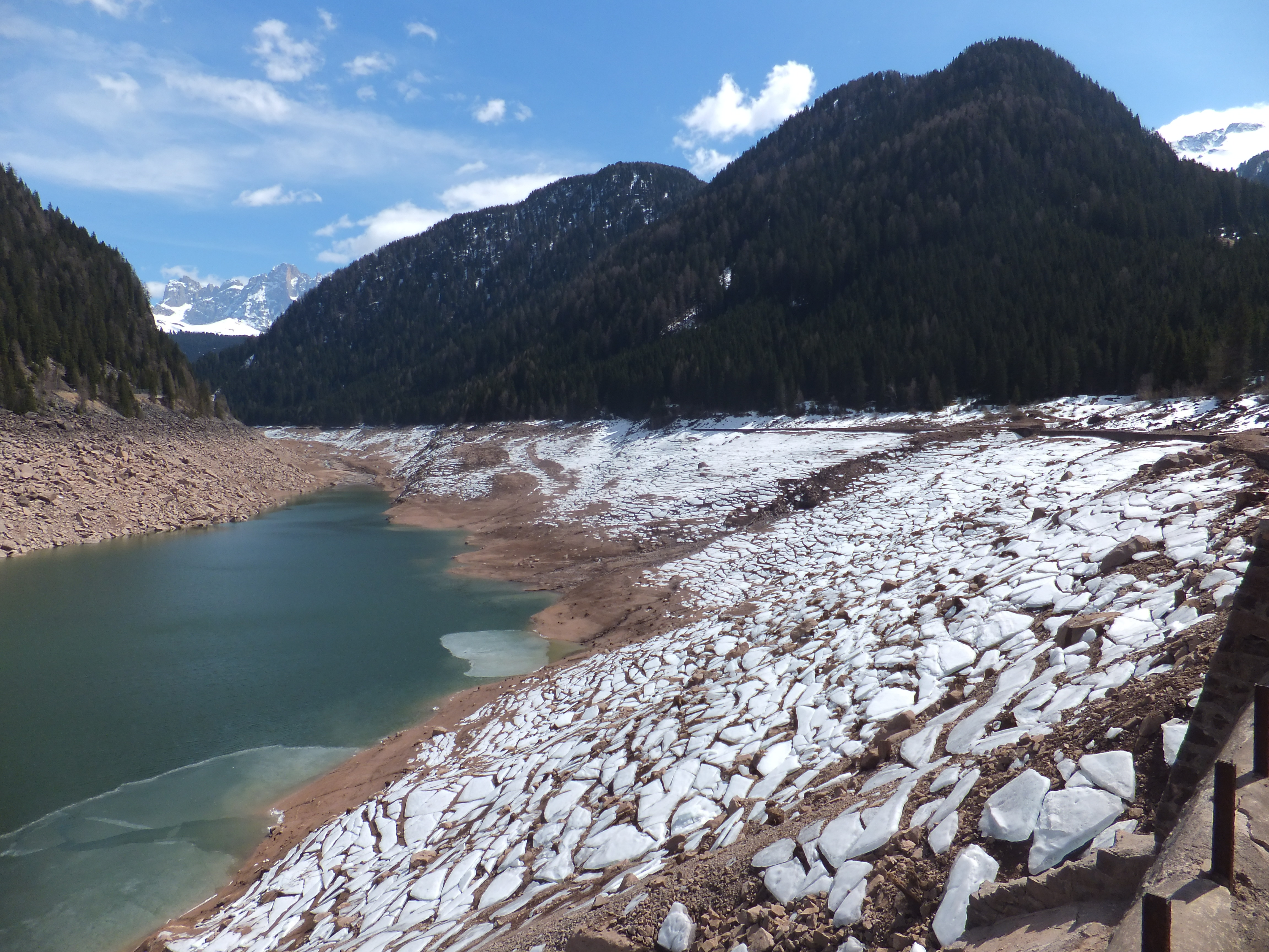 Lago di Paneveggio a livello d'acqua basso, con la neve spaccata "a gradini" sulla riva